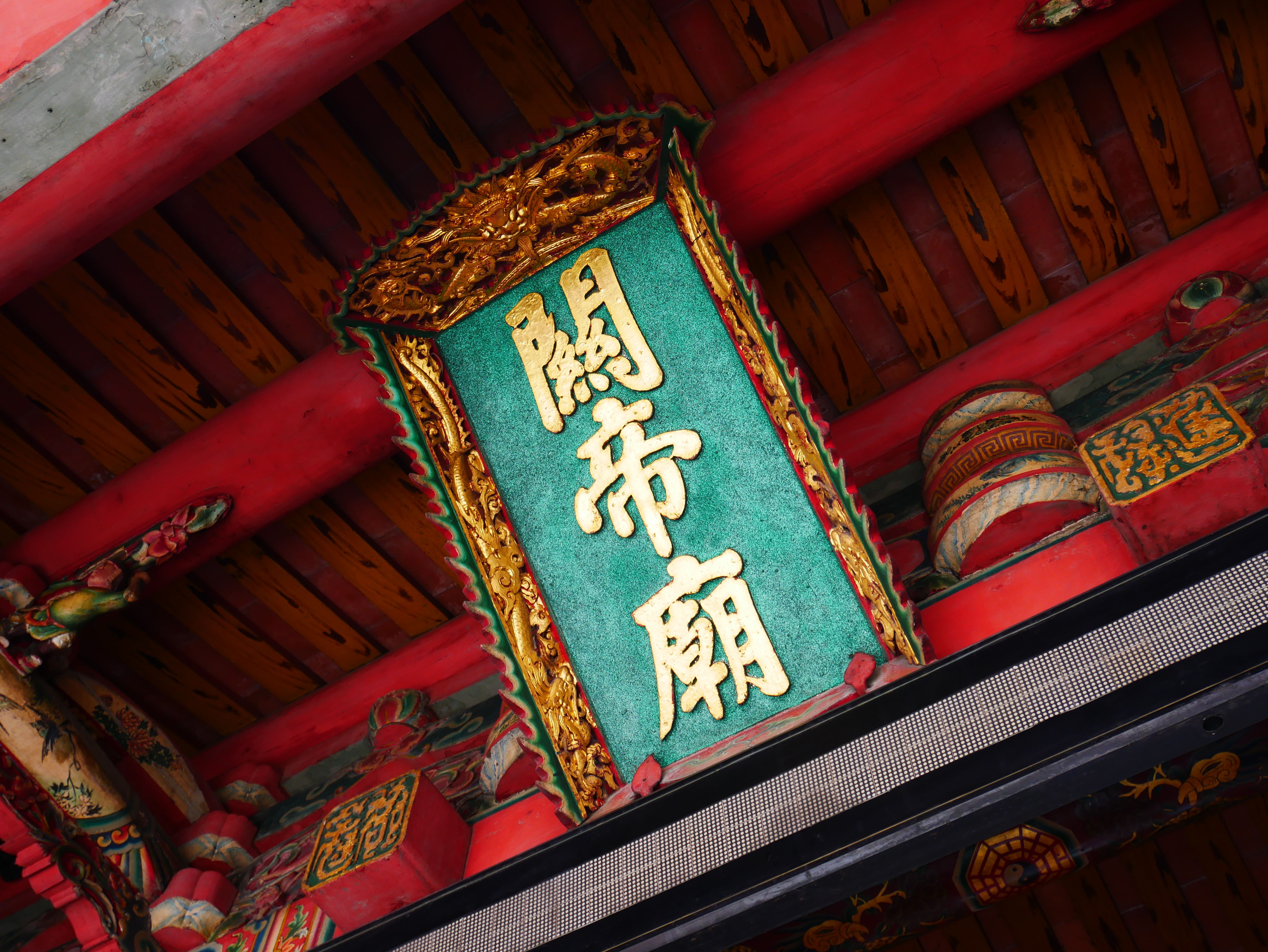 中文（台灣）: 新竹關帝廟廟名匾，新竹市東區南門聯里關帝里